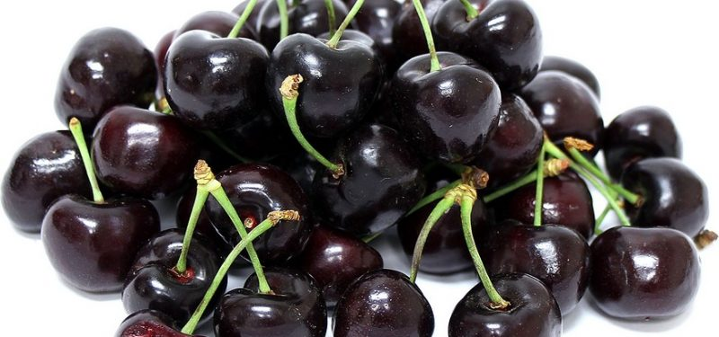 cerejas